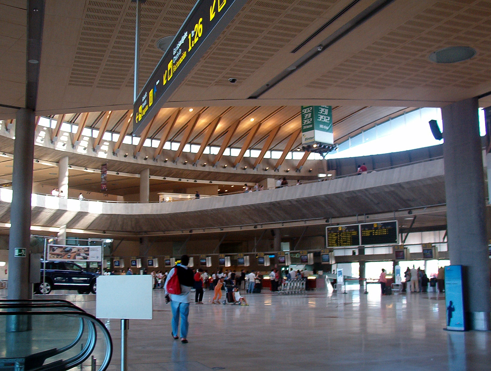 Nuevo Edificio Terminal Edificio Terminal del Aeropuerto de Tenerife Norte inaugurado en 2003.